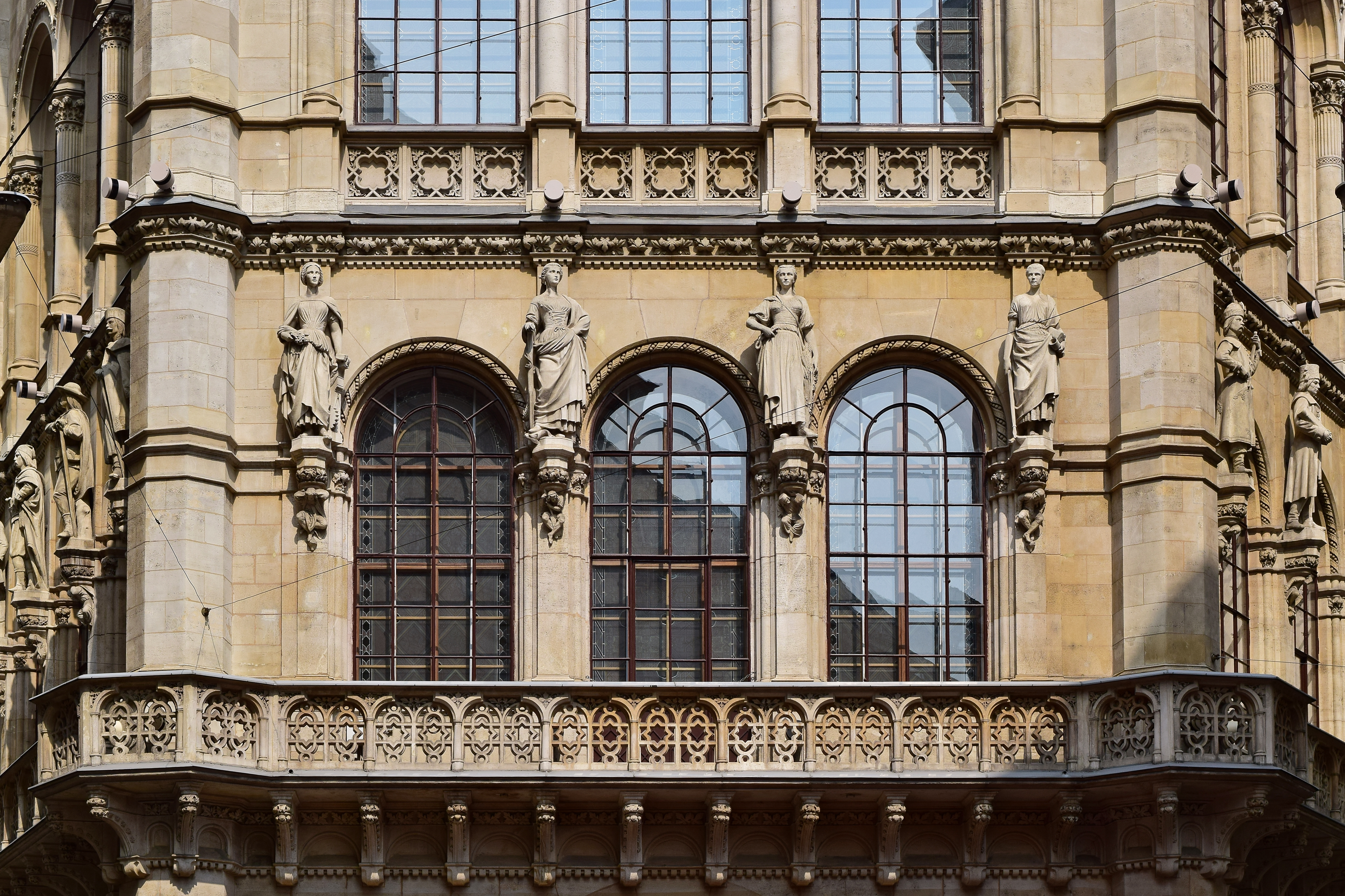 Palais Ferstel, ehem. österr. Nationalbank samt Hofbrunnen, Cafe Central